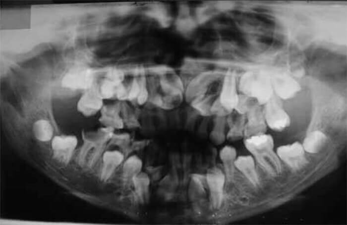 Odontoma na região dos incisivos centrais.